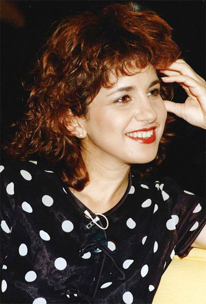 ענת וקסמן